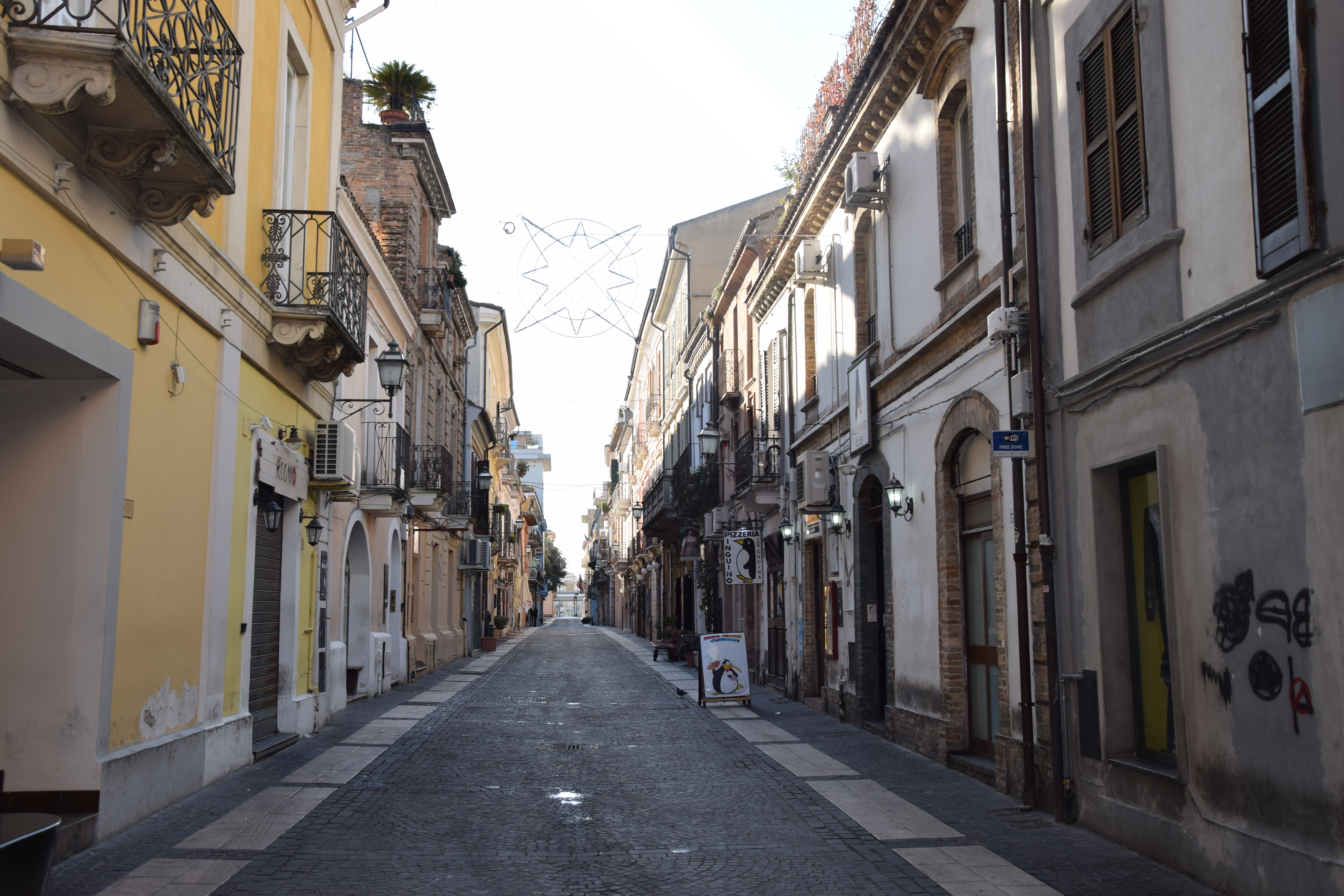 Corso Manthone Pescara